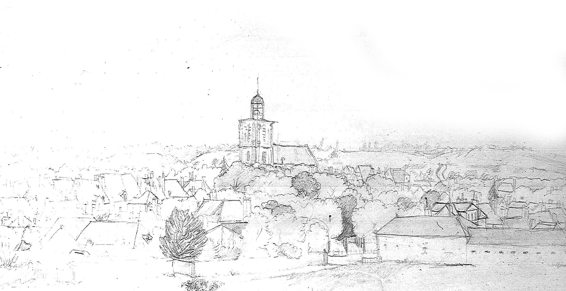 une vue de cf. titre.